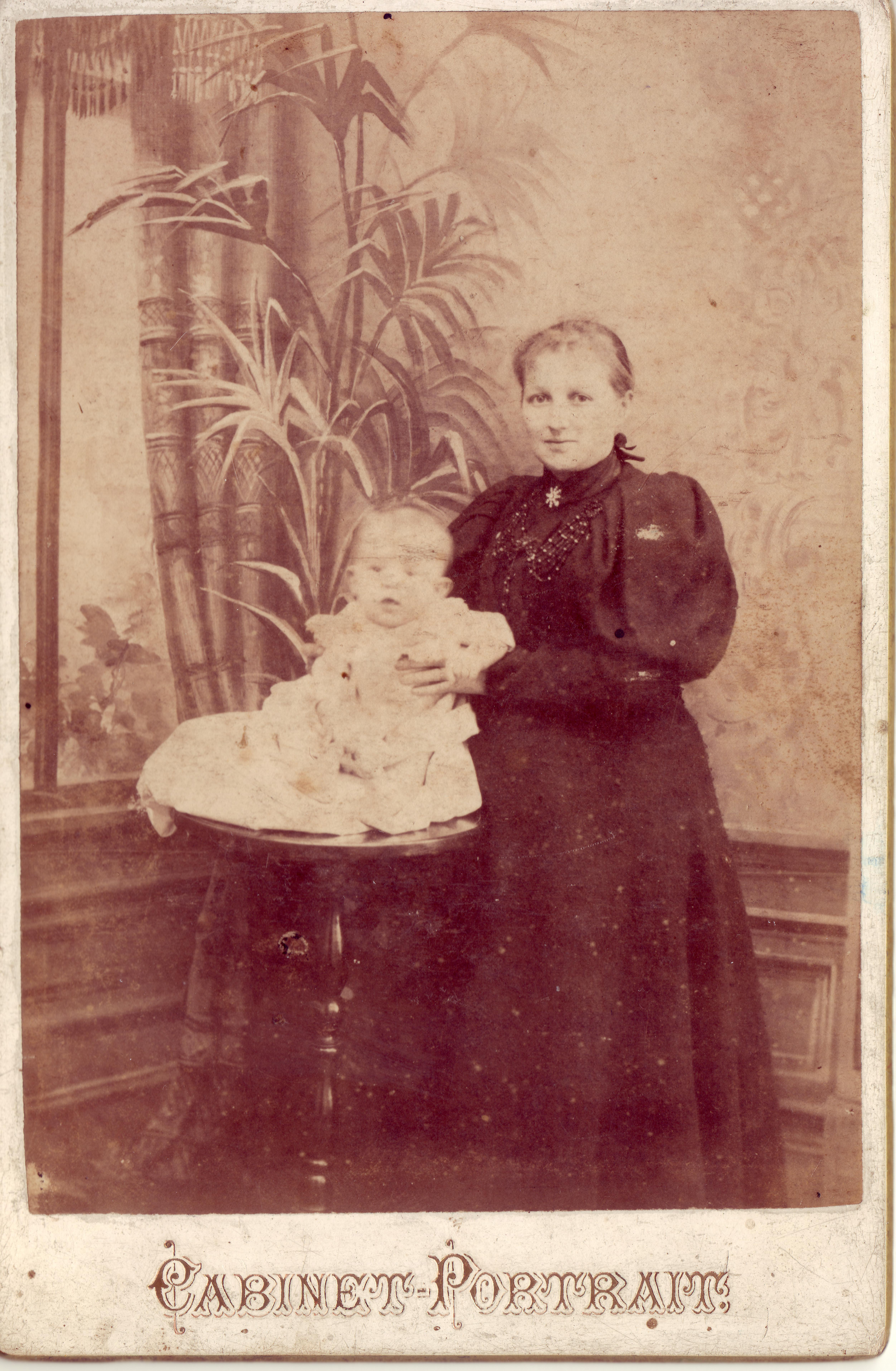 Fotografuota Kijeve, apie 1894 metus.